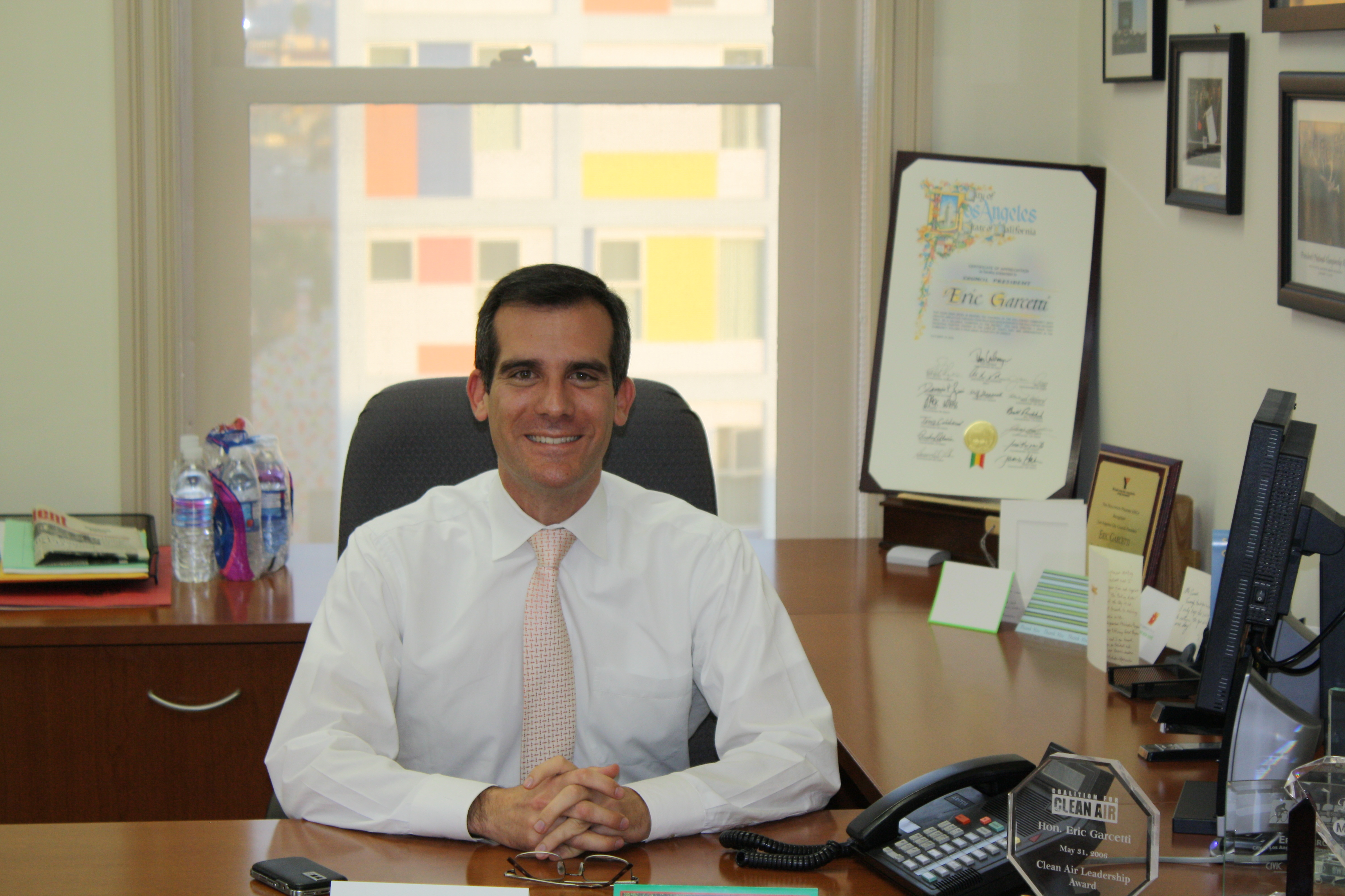 Los Angeles Mayor Eric Garcetti